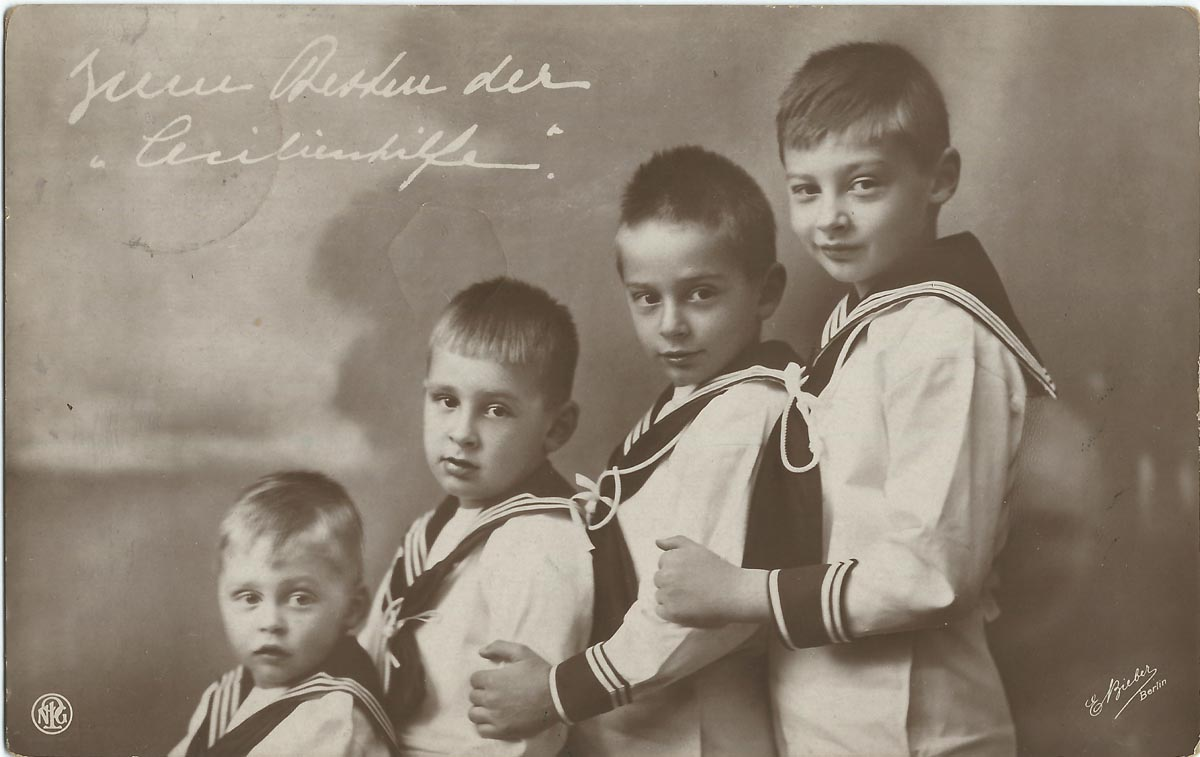 Carte postale figurant les 4 fils du Kronprinz Wilhelm von Preußen et de Cecilie zu Mecklenburg : Wilhelm von Preußen, Louis Ferdinand von Preußen, Hubertus von Preußen, Friedrich von Preußen.